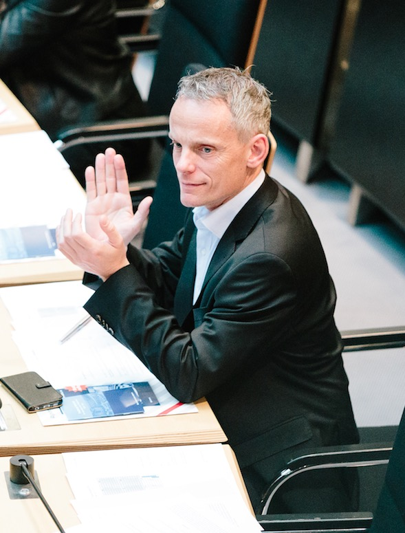 Tino Schopf im Plenum des Abgeordnetenhauses von Berlin